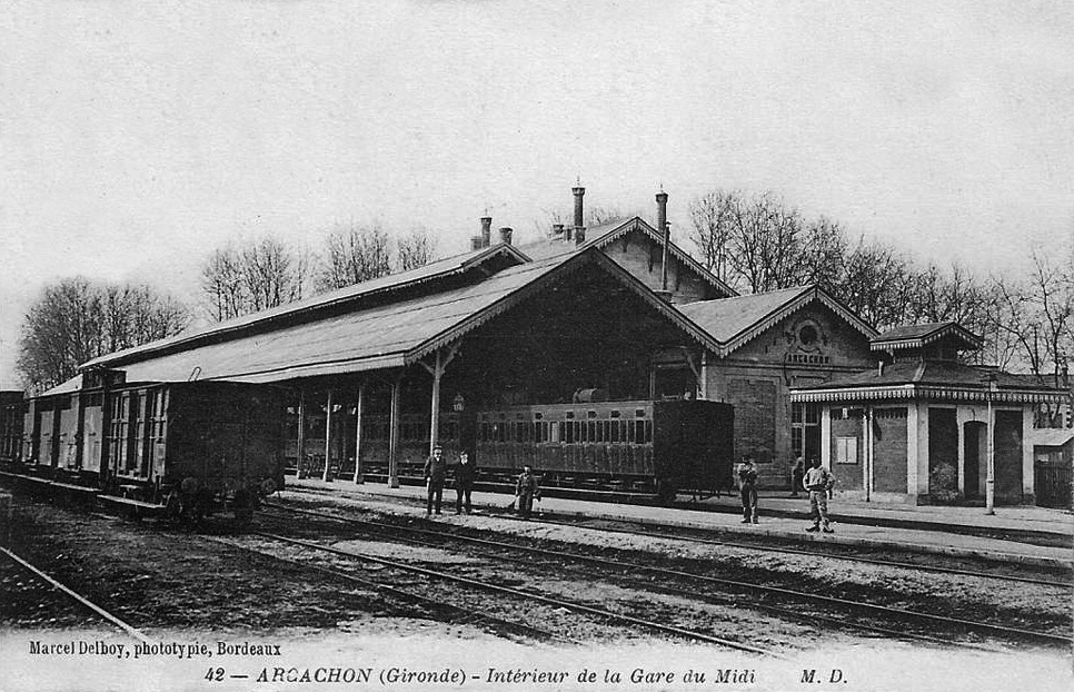 Voies, quais et verrière de la gare d'Arcachon vers 1900.